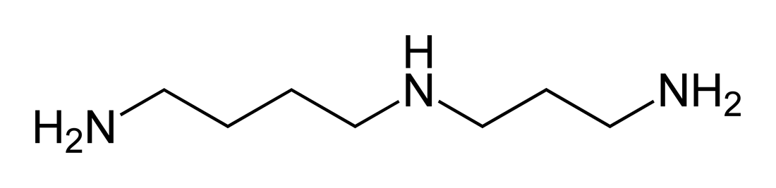 Skeletal formula of spermidine (N1-(3-aminopropyl)butane-1,4-diamine)